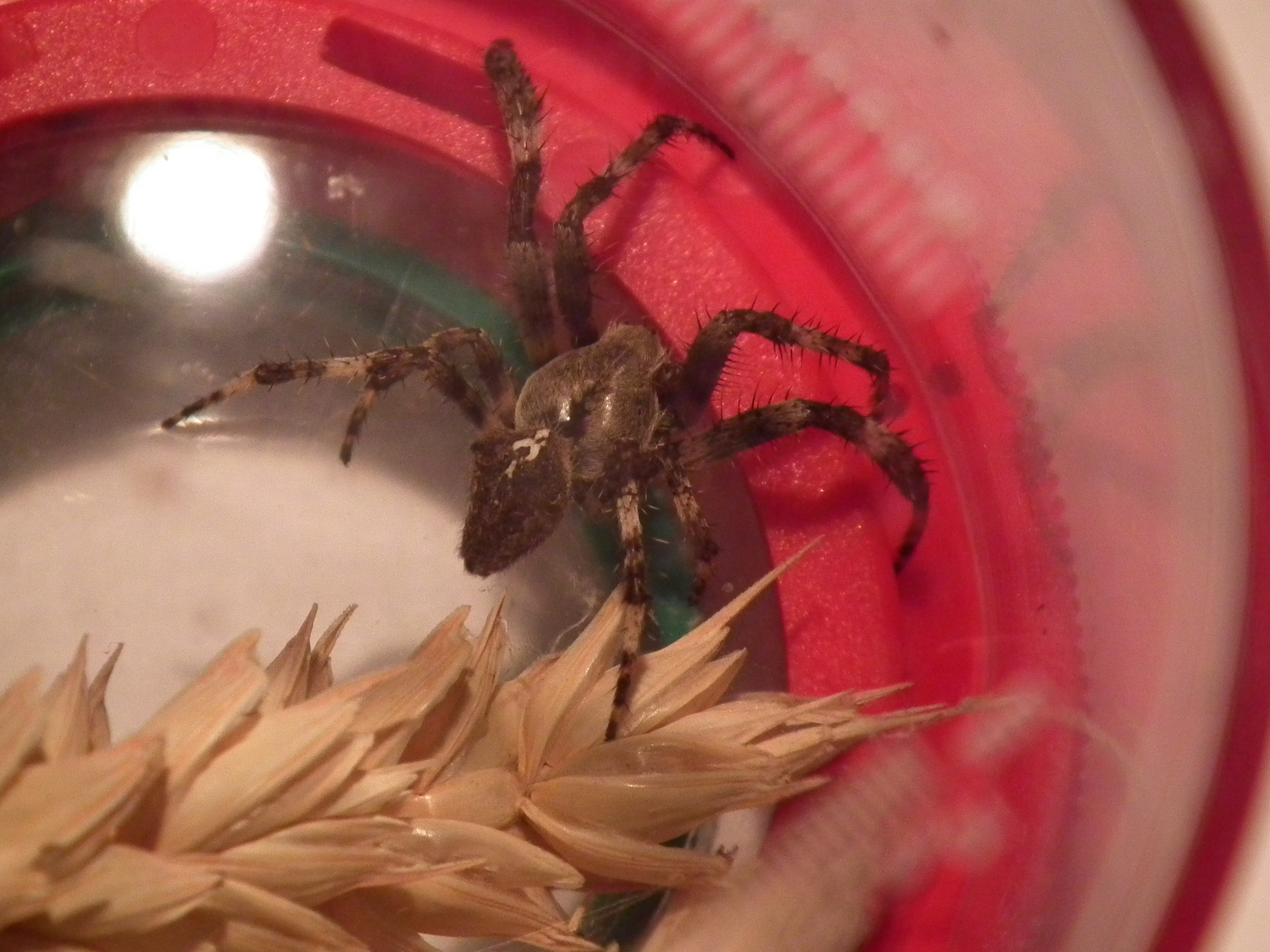 Spinne aus einem Garten in einem Wohngebiet in Nordbaden (Deutschland)